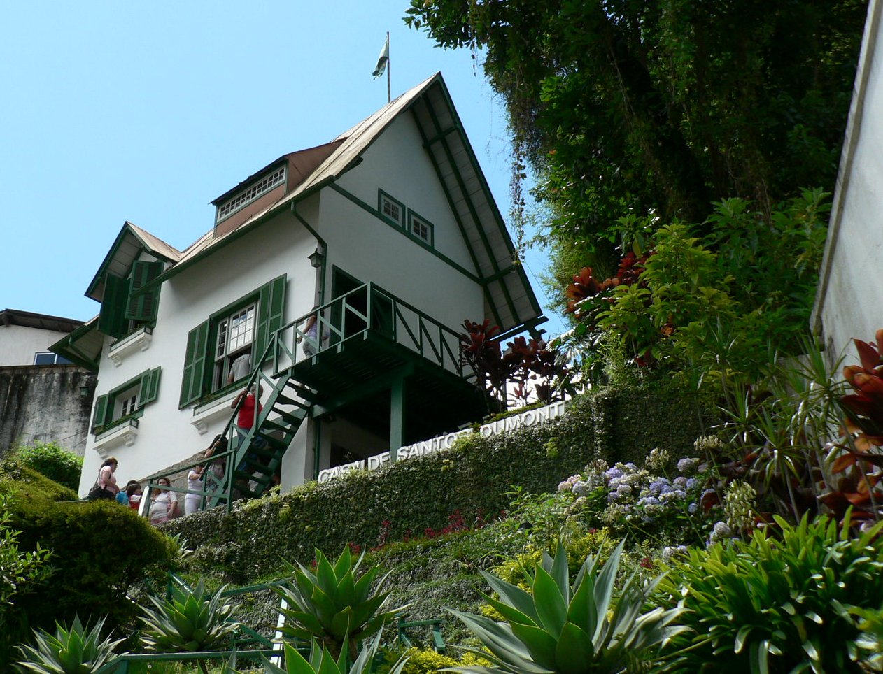 Casa de Santos Dumount, Petrópolis